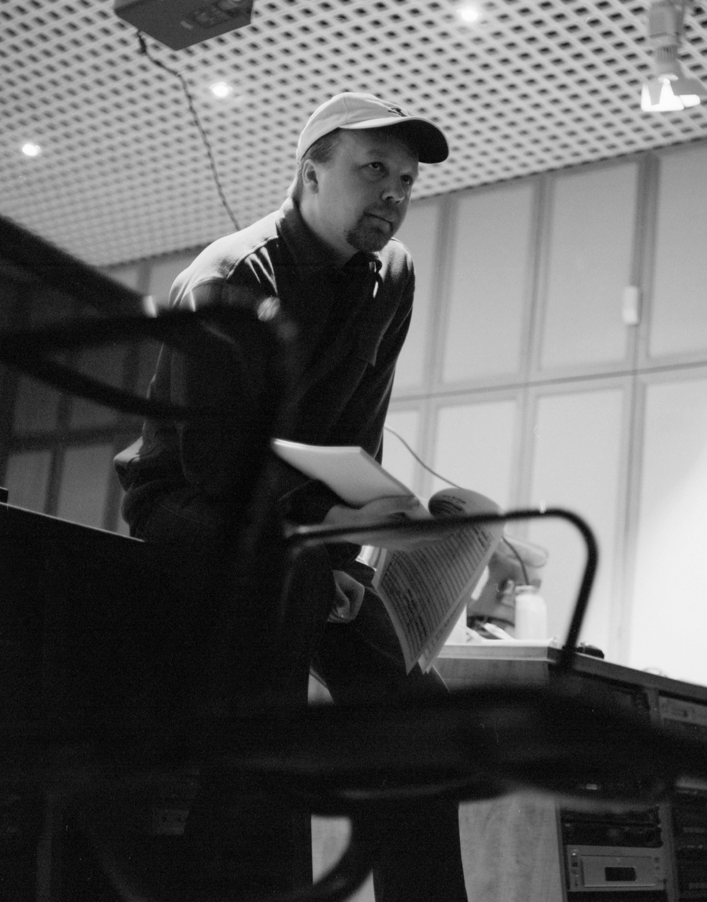 Ralf Wienrich während einer Aufnahme mit dem Filmorchester Babelsberg in Berlin